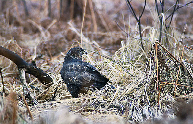 Buteo buteo